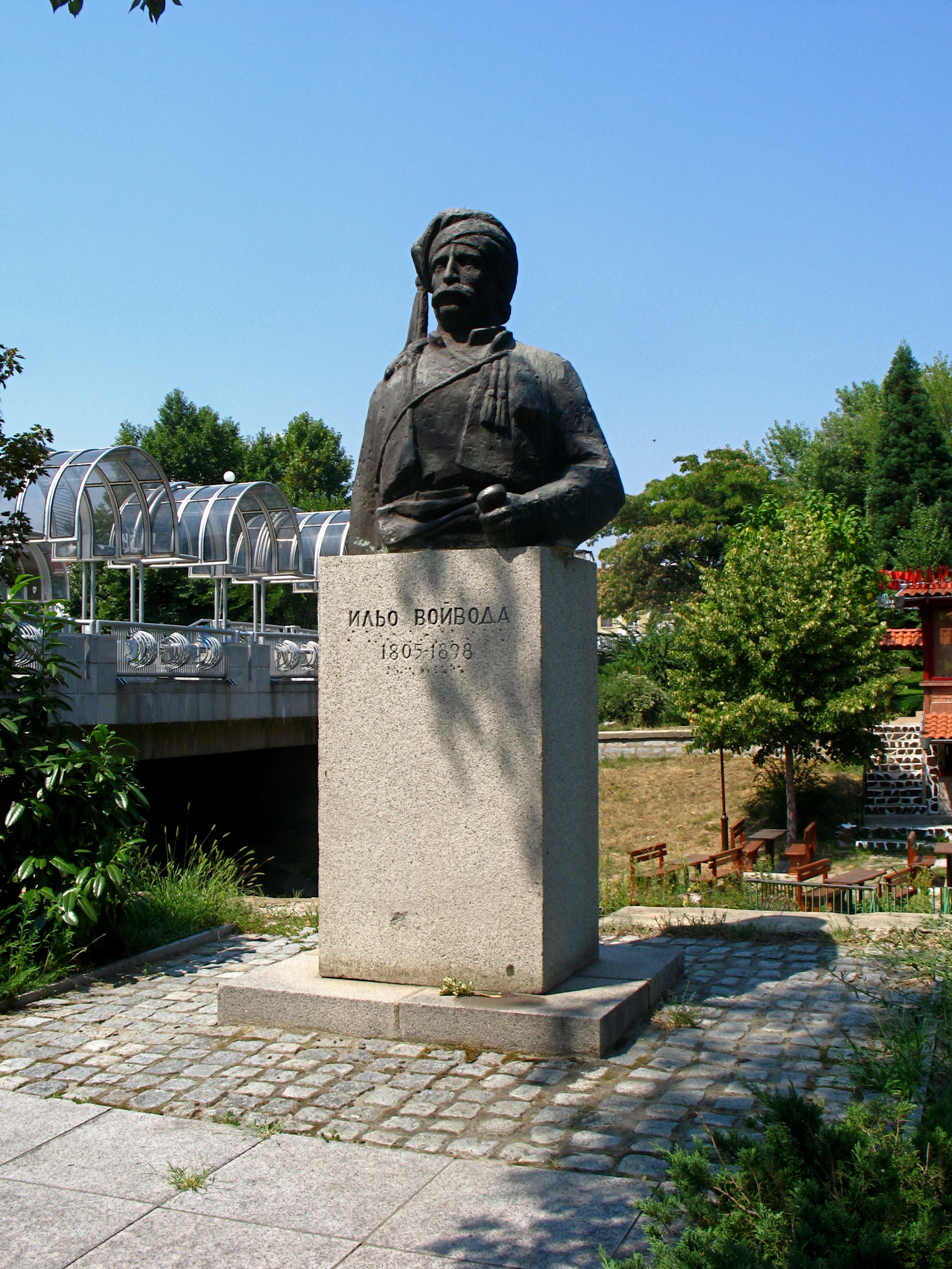 Паметник на Ильо войвода в Благоевград, България, улица „Александър Стамболийски“, близо до площад „Македония“.